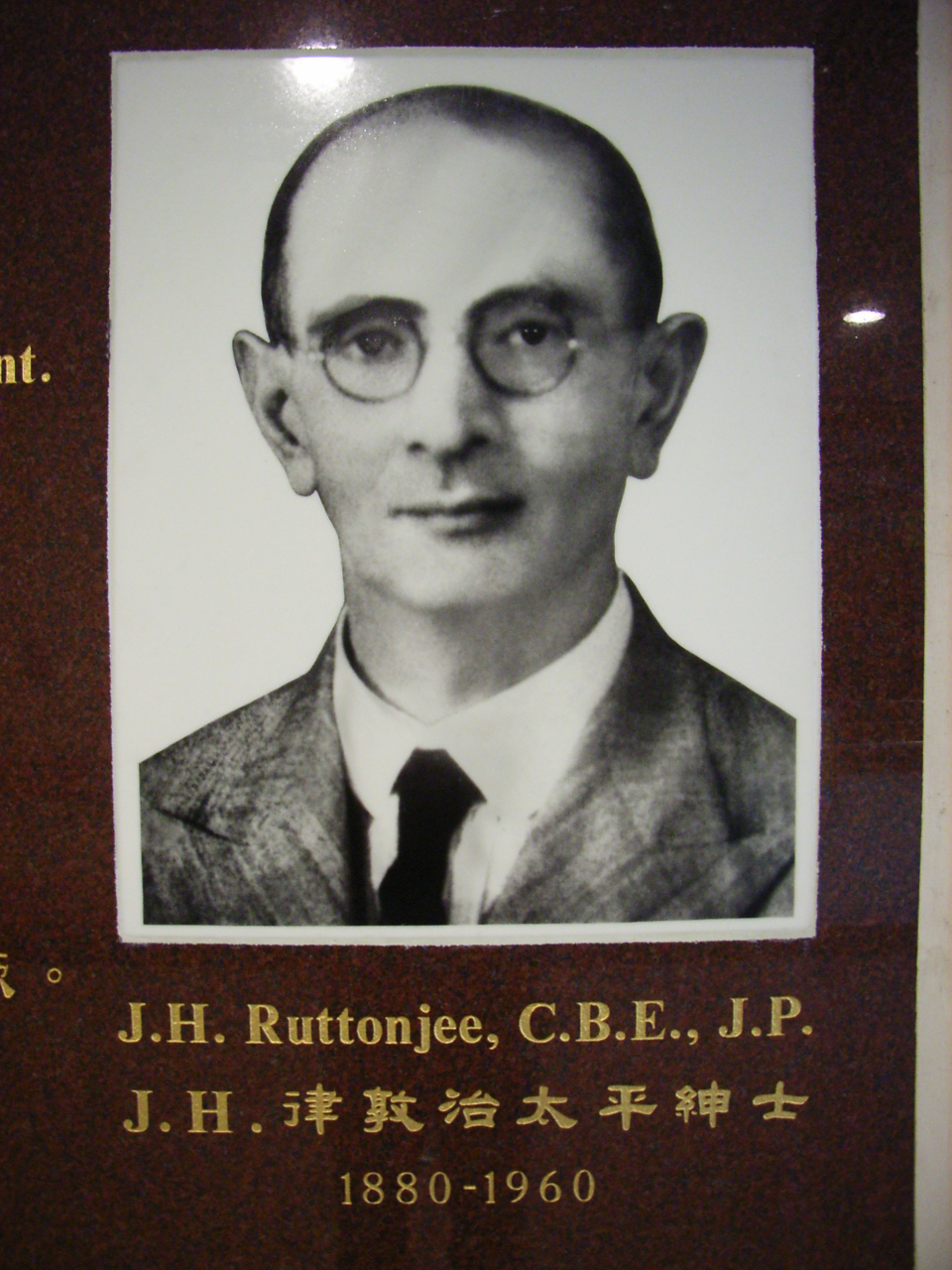 J.H. Ruttonjee CBE JP & 律敦治醫院 Ruttonjee Hospital BY RICHARD MARTIN.